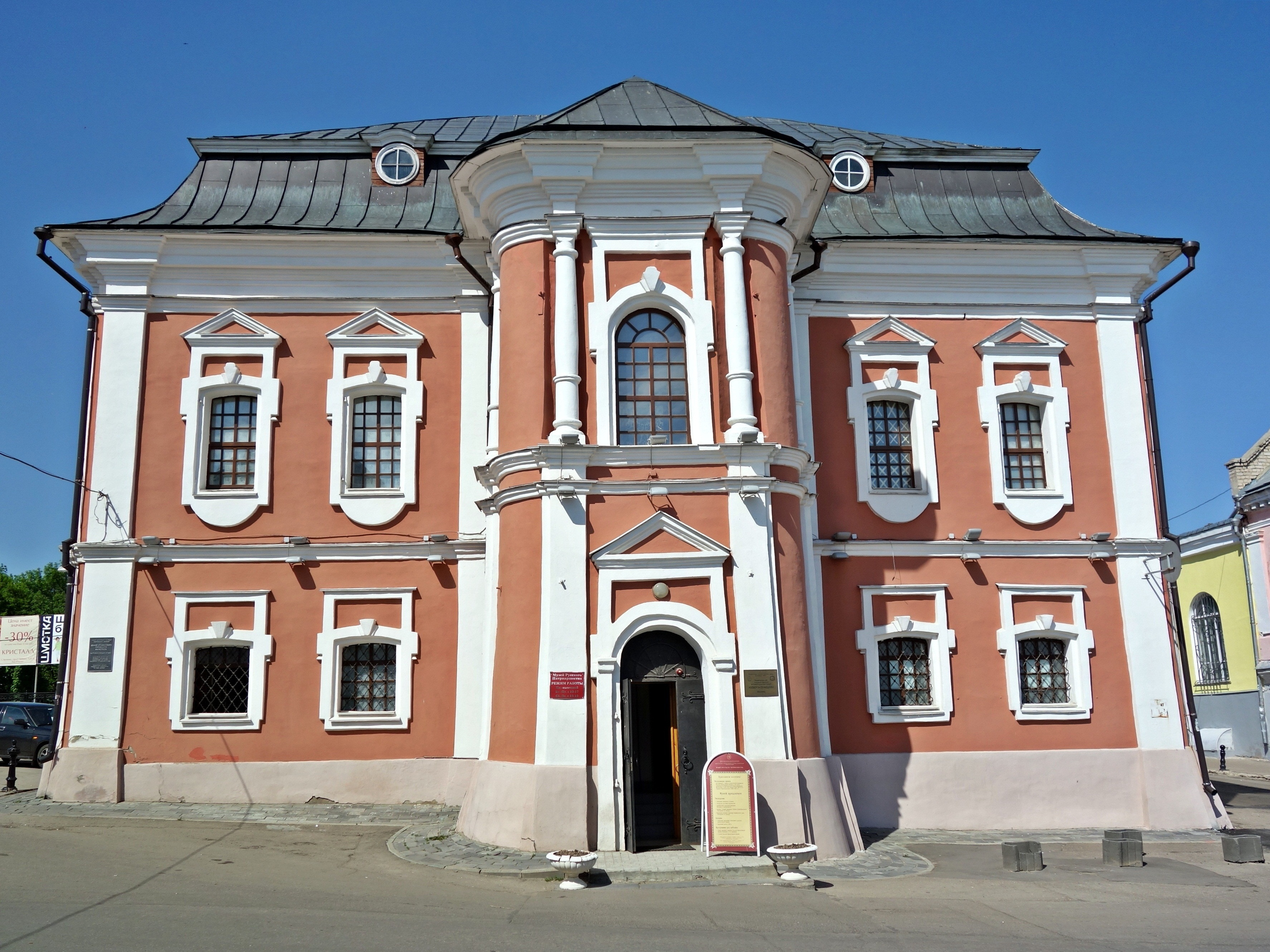 здание Магистрата: Соборная площадь, 1-А, Арзамас, Нижегородская область